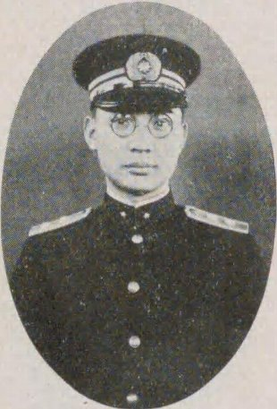 織田智（1899-1981）